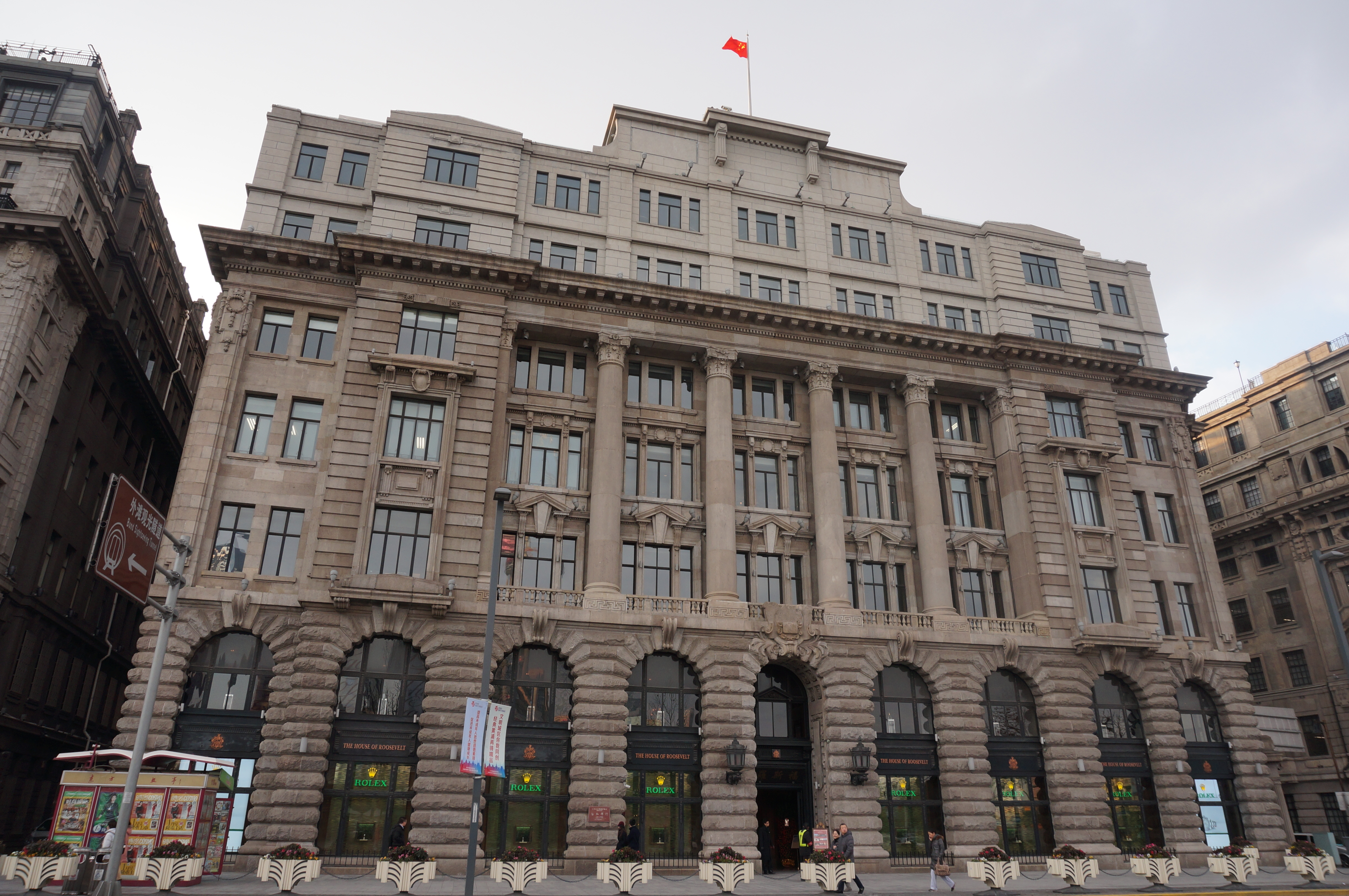 外滩怡和洋行大楼